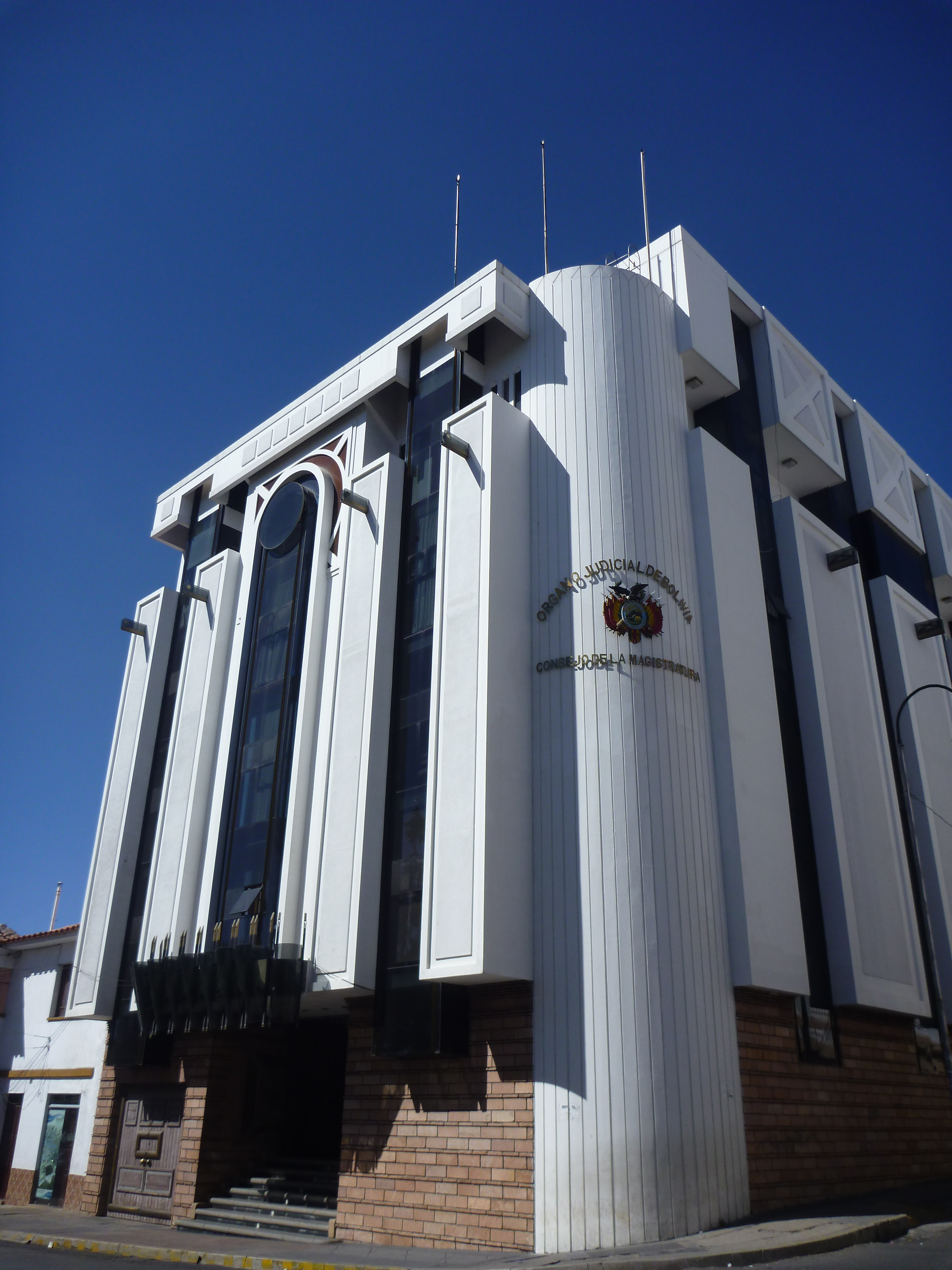 Consejo de Magistratura de Bolivia en Sucre.